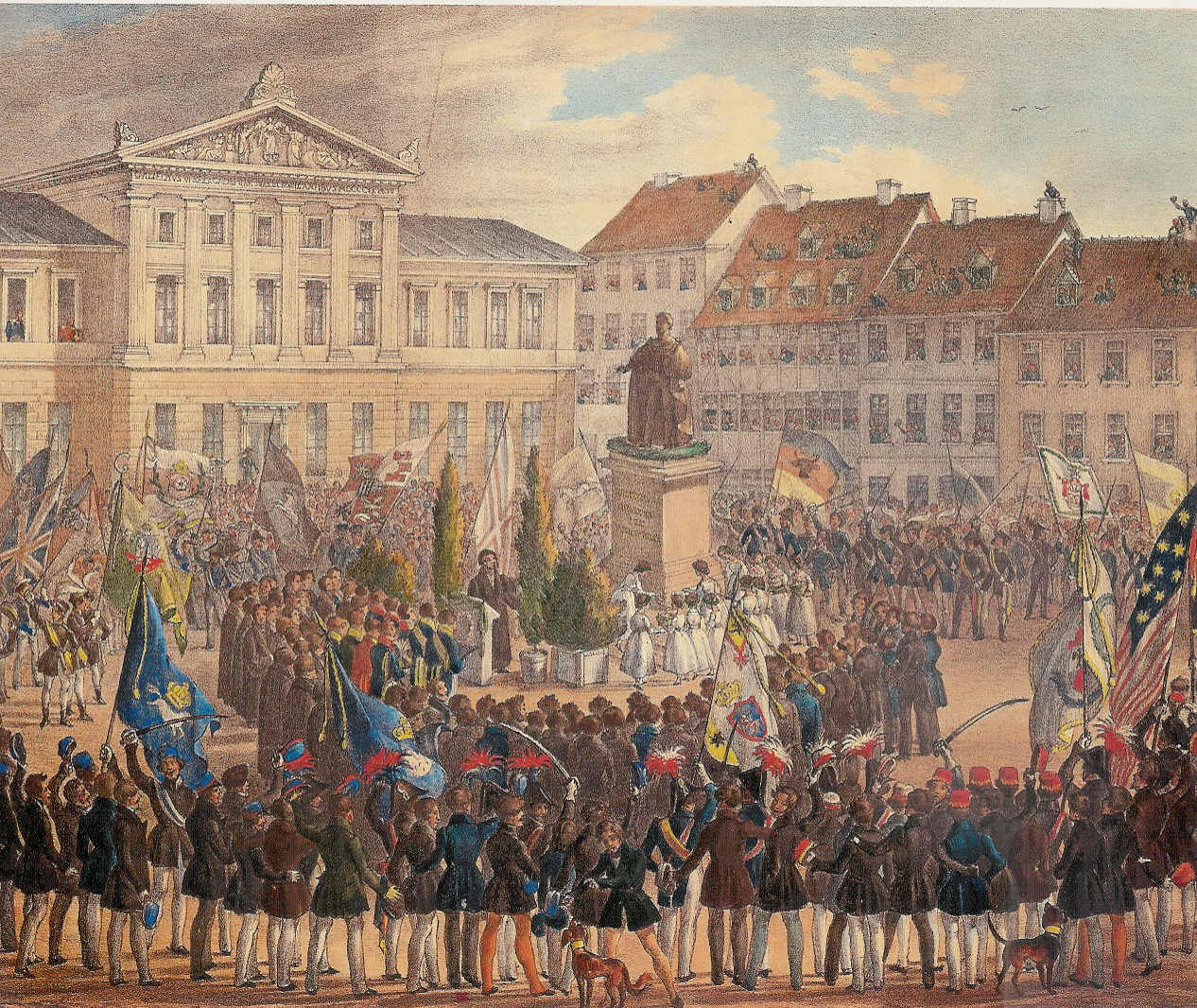 Enthüllung der Statue König Wilhelms IV., kolorierte Lithographie von C. Rohde und Lange, um 1837, Denkmalsweihe am ersten Tage der Säcularfeier der Universität Göttingen, 17. September 1837